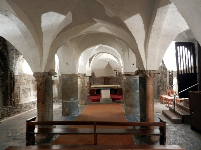 Aosta - Cripta della Cattedrale